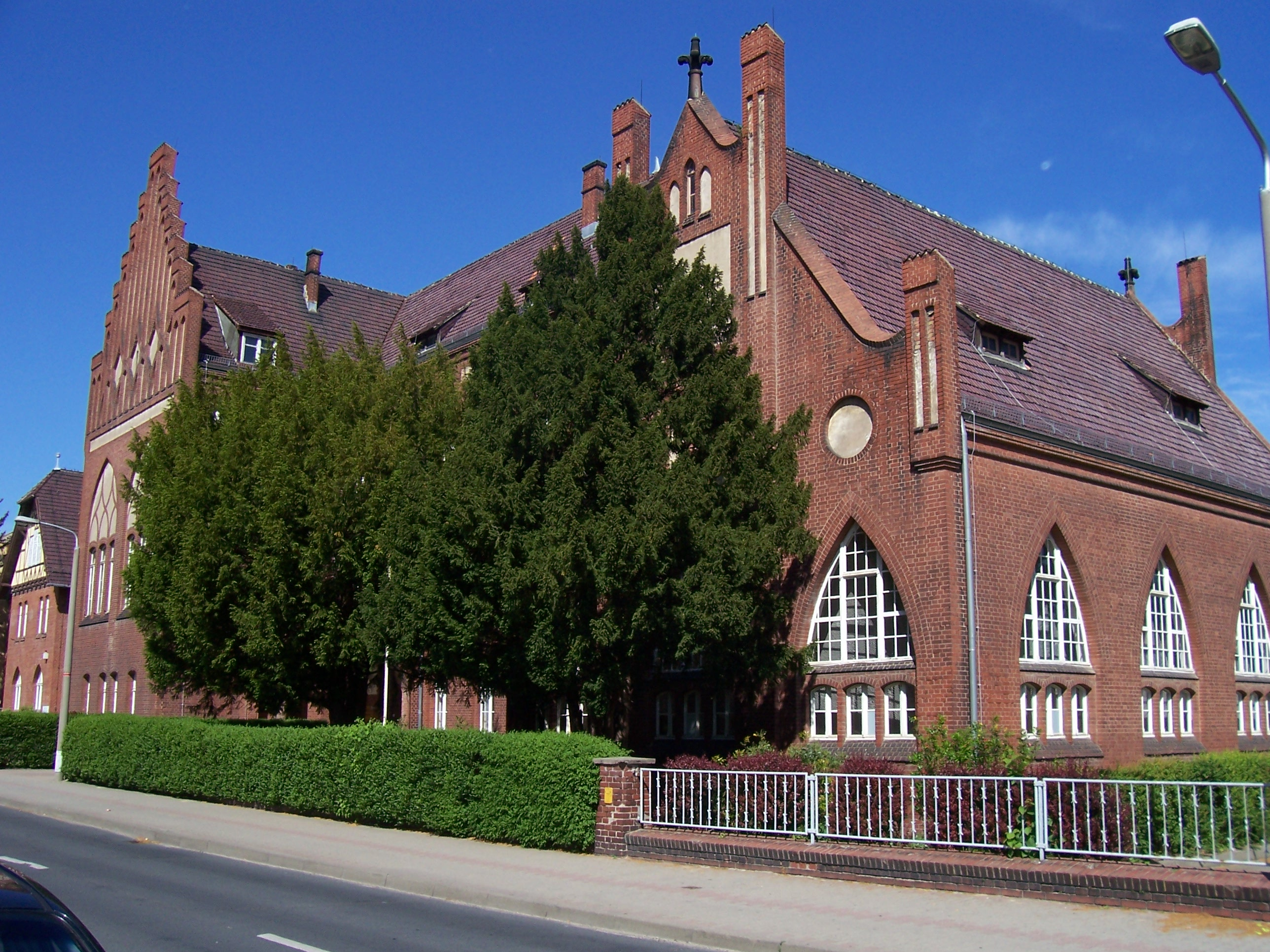 Außenansicht Schillergebäude des Goethe-Schiller-Gymnasiums Jüterbog, Deutschland.